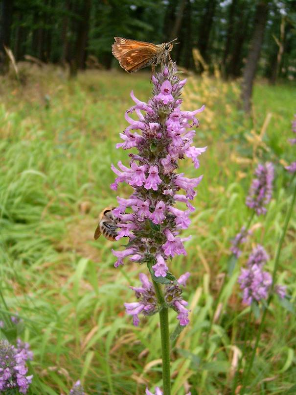 Motýl soumračník na bukvici lékařské foto Přírodní park Baba